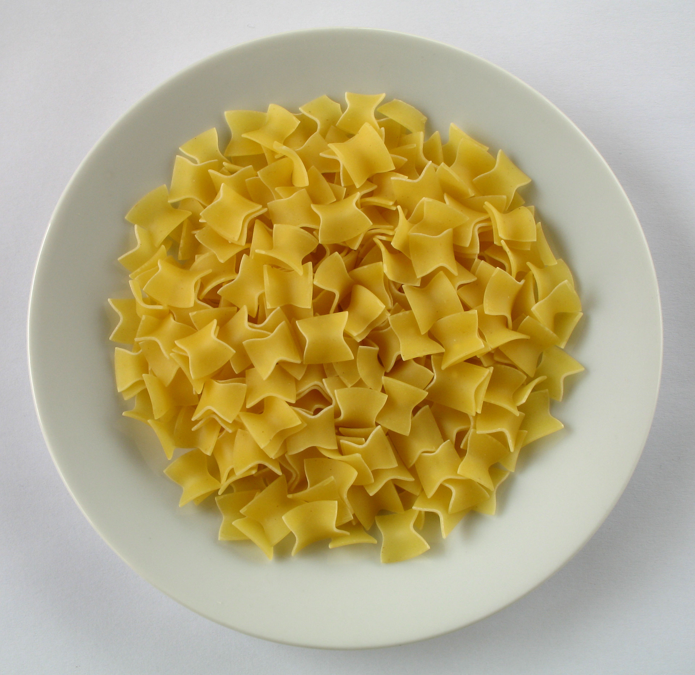 Fleckerl (Teigwaren)